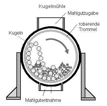 Kugelmühle